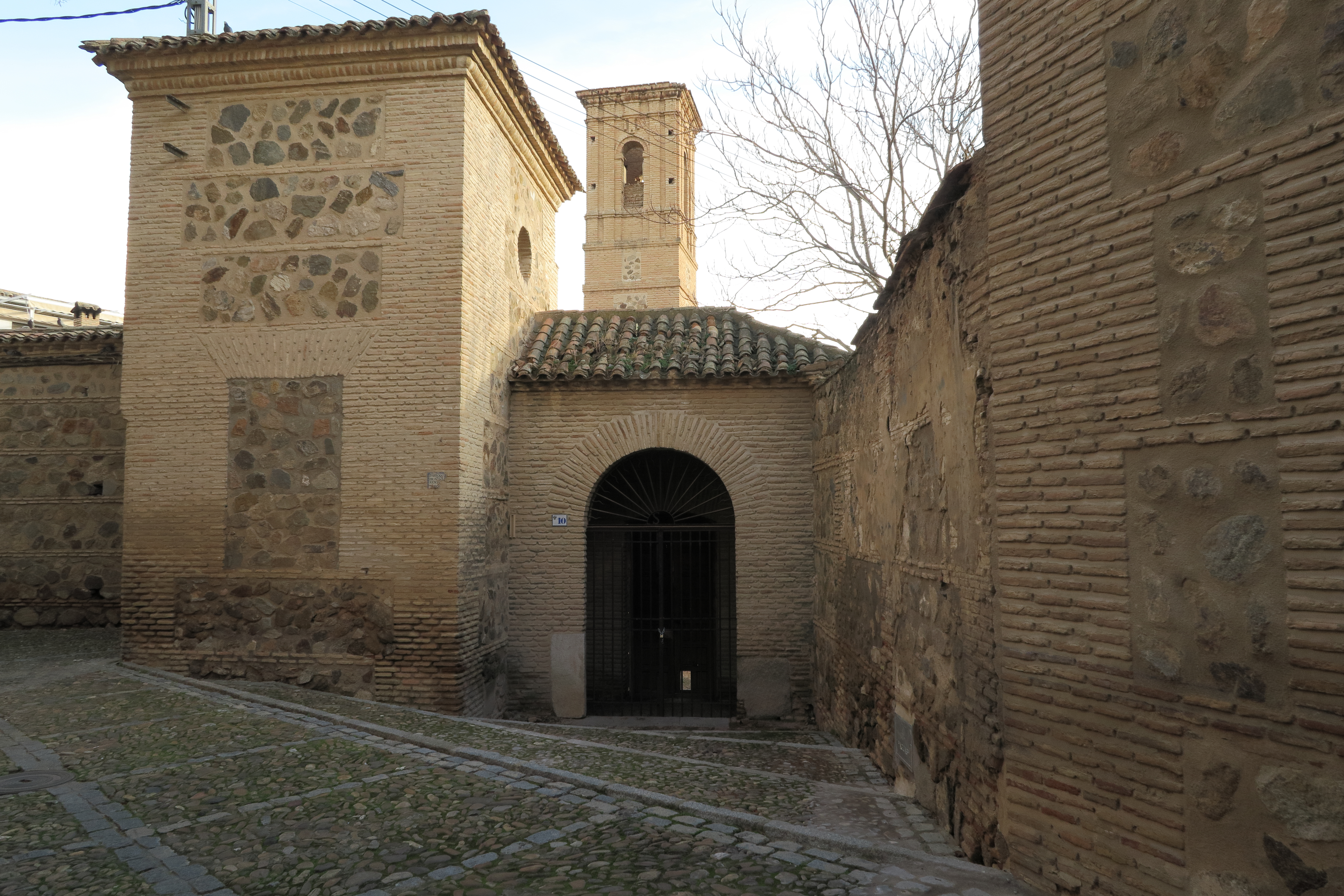 Iglesia de San Lorenzo, Toledo